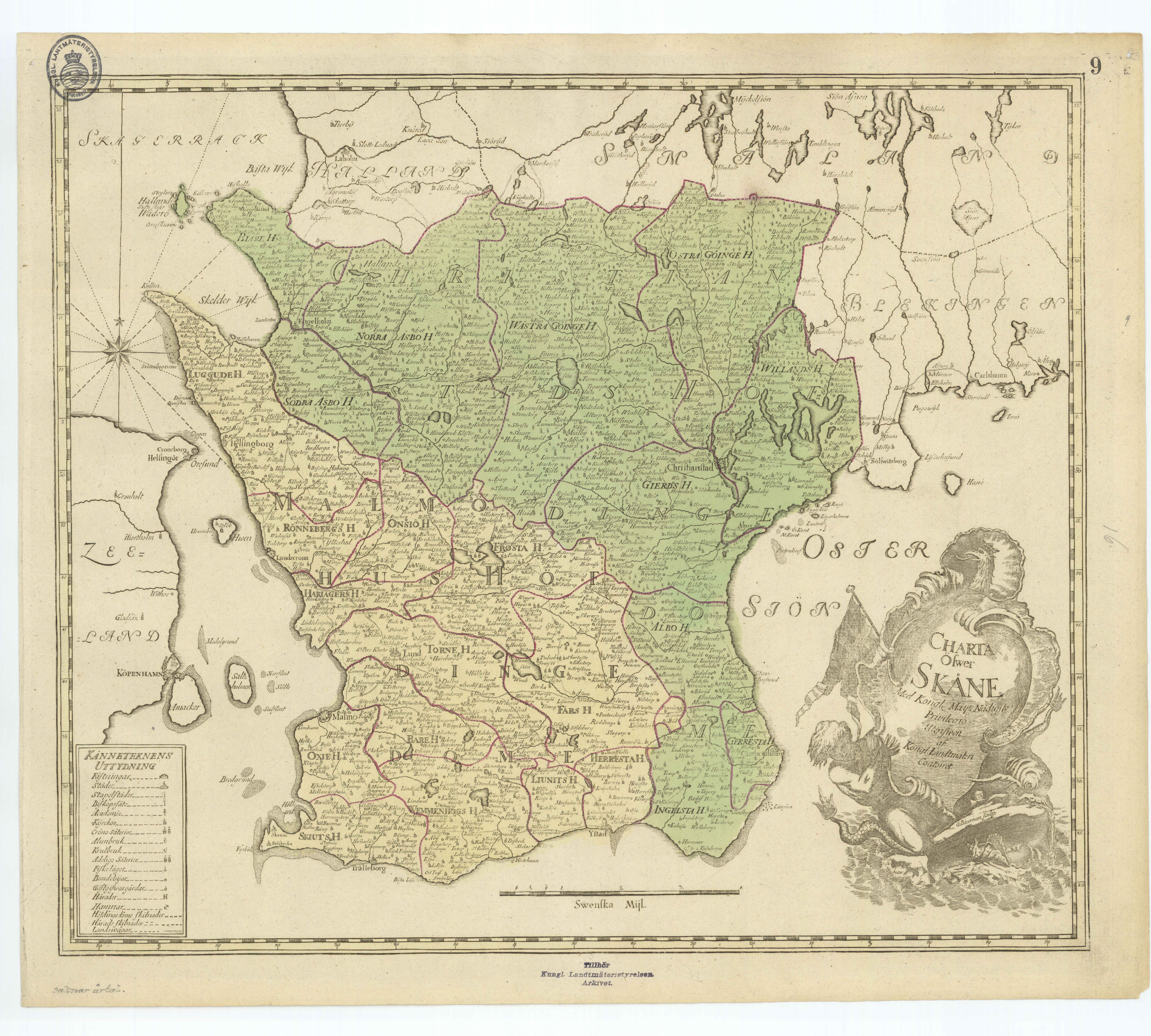 Generalkarta över Skåne, skapad på 1700-talet av Kungliga Lantmäteriet.